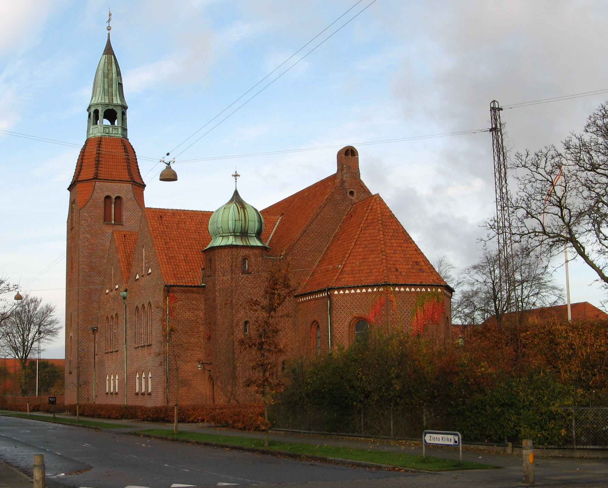 Zions kirke, Zions sogn, Esbjerg kommune (former: Skads Herred, Ribe Amt). Kirken set fra øst